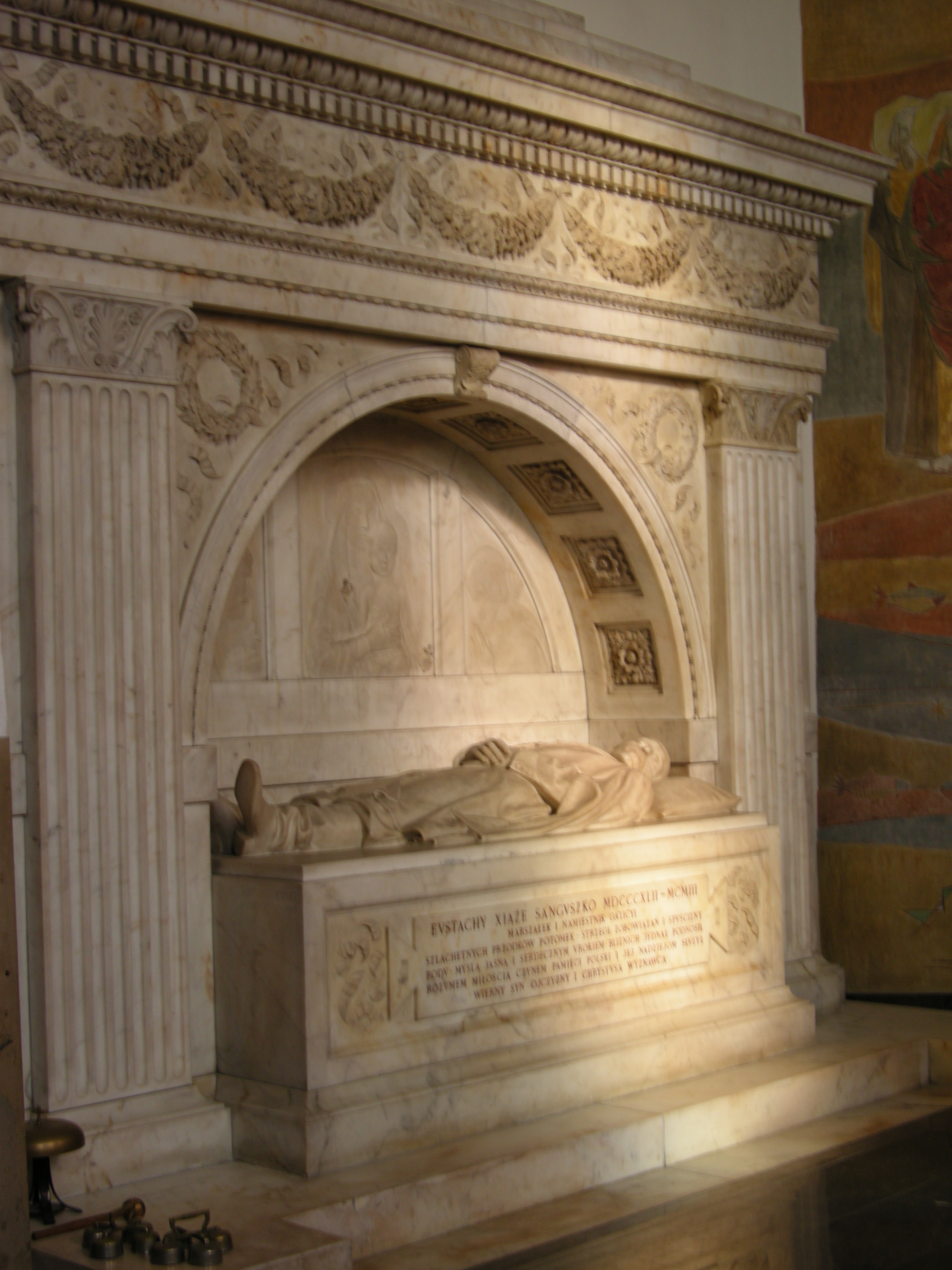 Pomnik księcia Eustachego Sanguszki autorstwa Antoniego Madeyskiego.